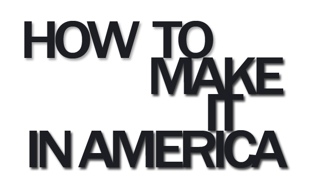 logo how to make it in america